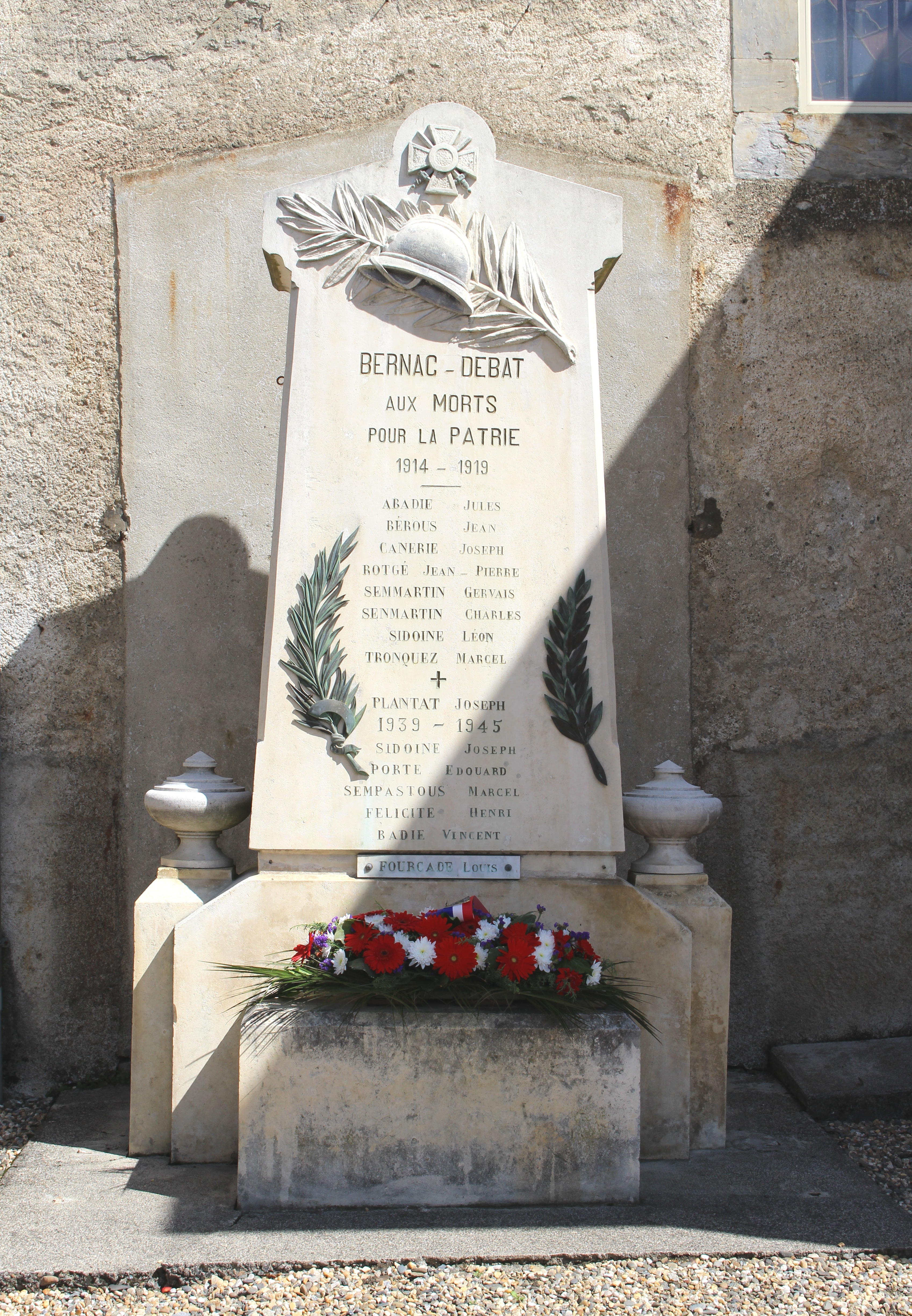 Monument aux morts de Bernac-Debat (Hautes-Pyrénées)